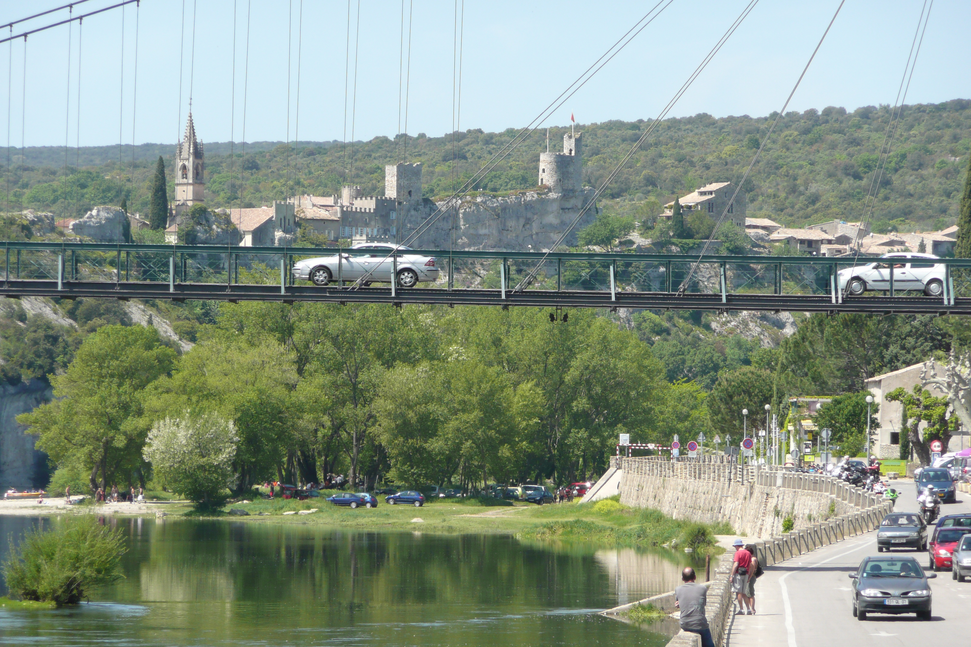 Détail Pont à Saint-Martin-d'Ardèche.